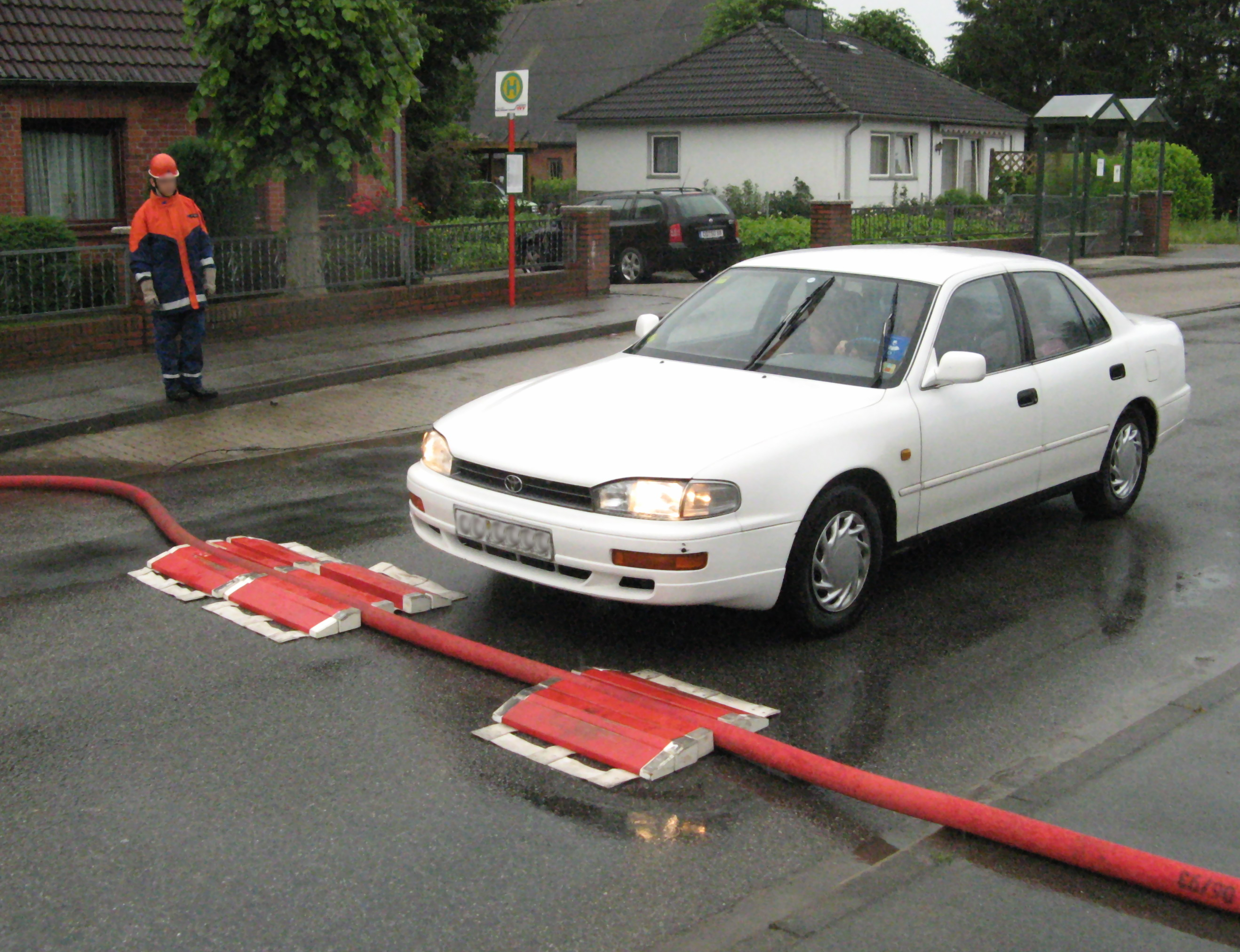 Jugendfeuer mit Schlauchbrücke